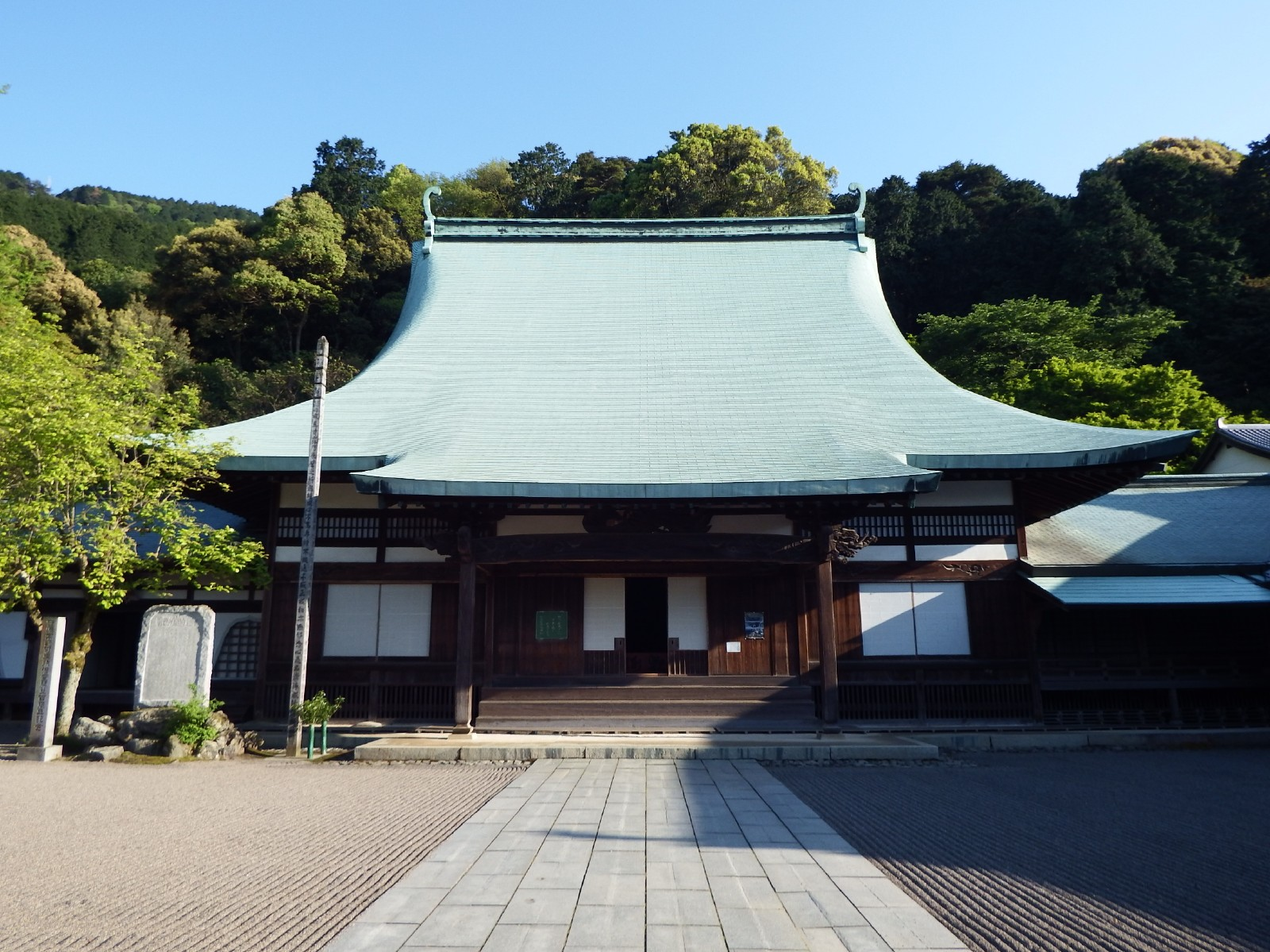 瑞応寺の本堂